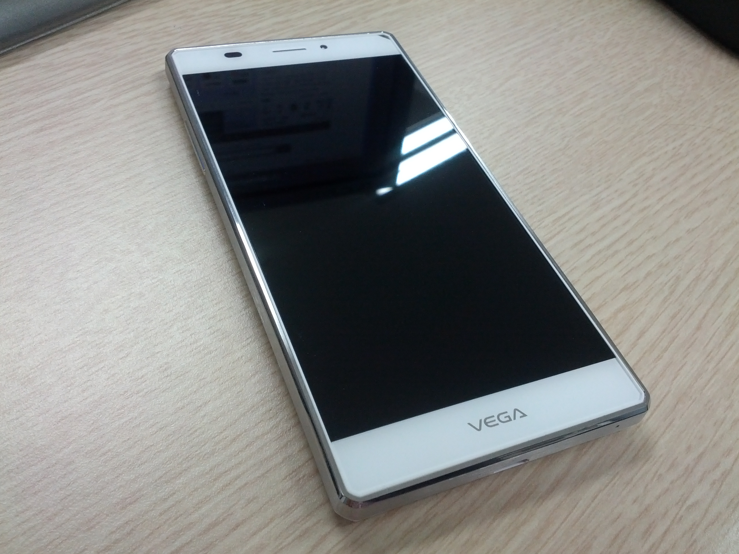 위 사진은 Pantech VEGA Iron 로서 사진을찍으신분이 위키미디어에 업로드를 원하시고 위키미디어에 파일이 공유되는것을 원하여 합의 후 올림